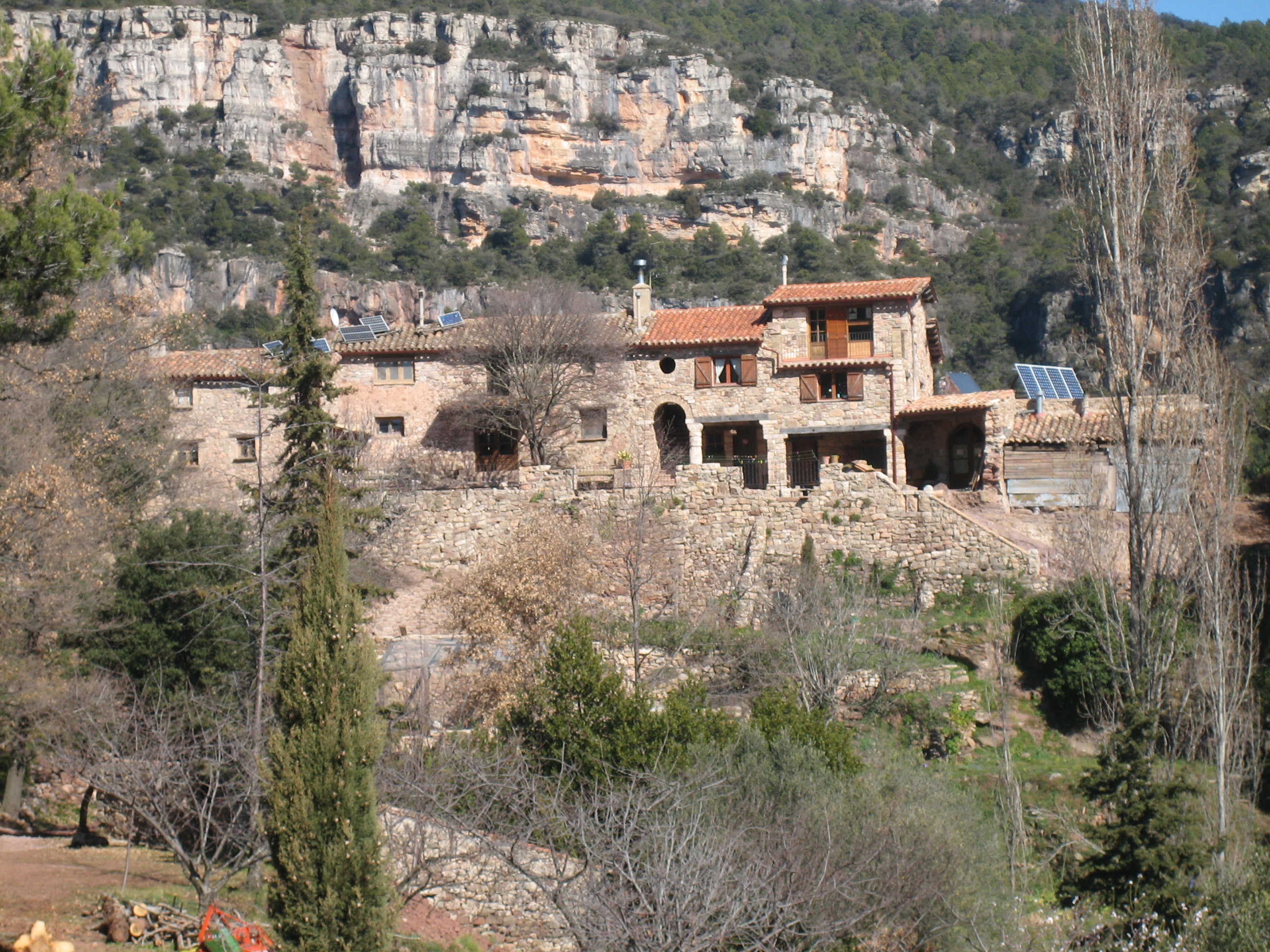 La Bartra, Tarragona, Cataluña, España